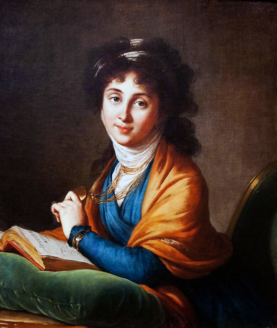 Наталья Захаровна Колычева, ур. Хитрово (1774—1803).